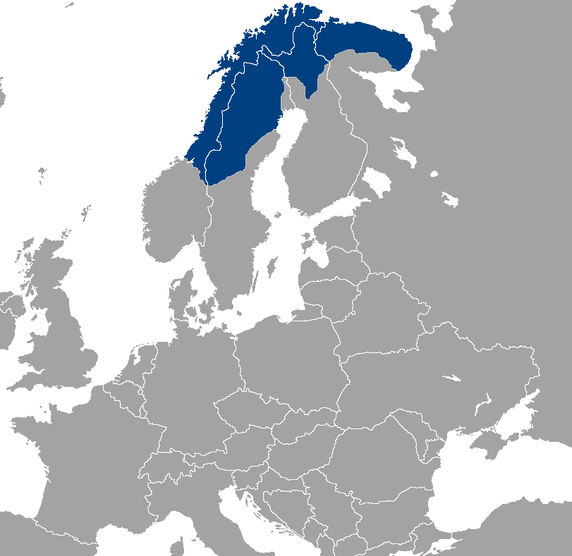 Mapa sámské domoviny v severní Evropě